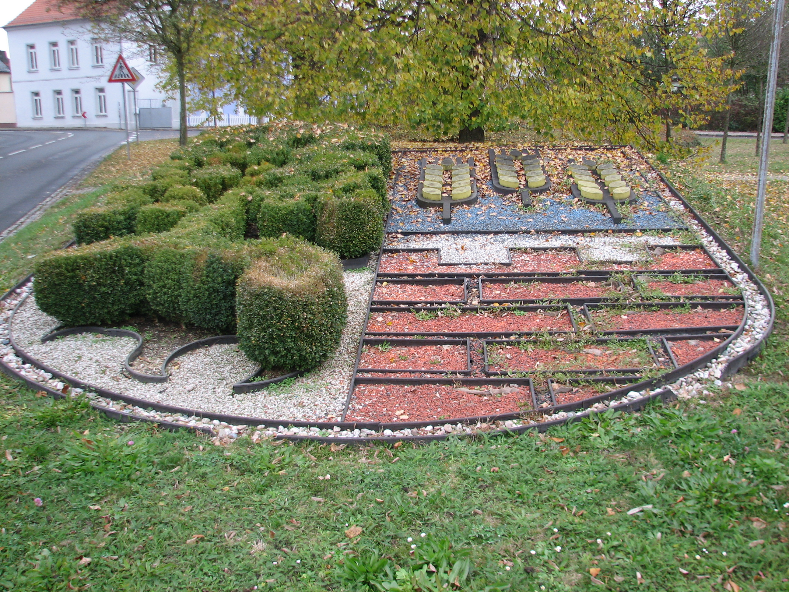 Das Wappen von Machern, hier in der floralen Version zwischen Kirche und Schnetgers Hof